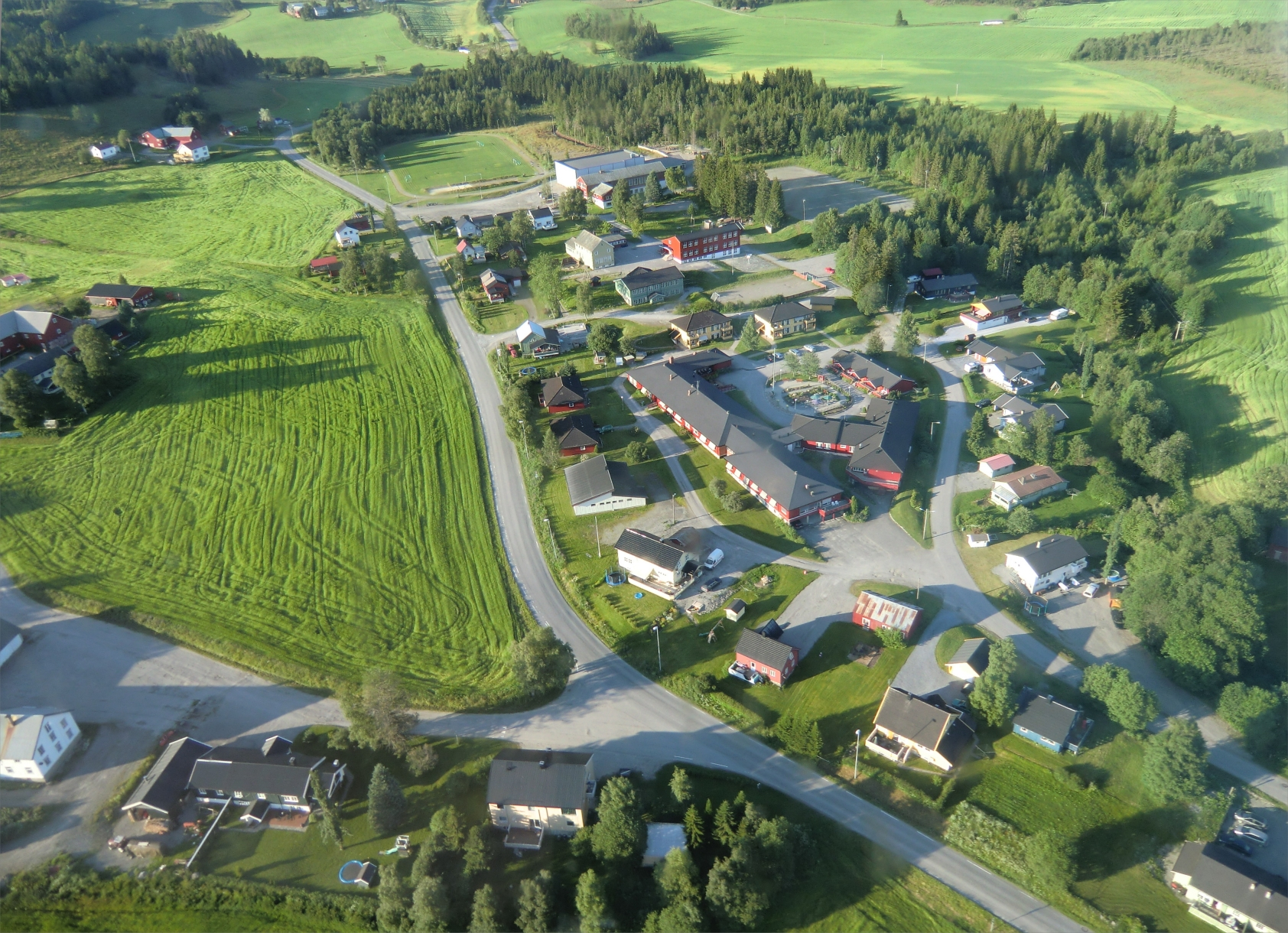 Flyfoto av Binde sentrum